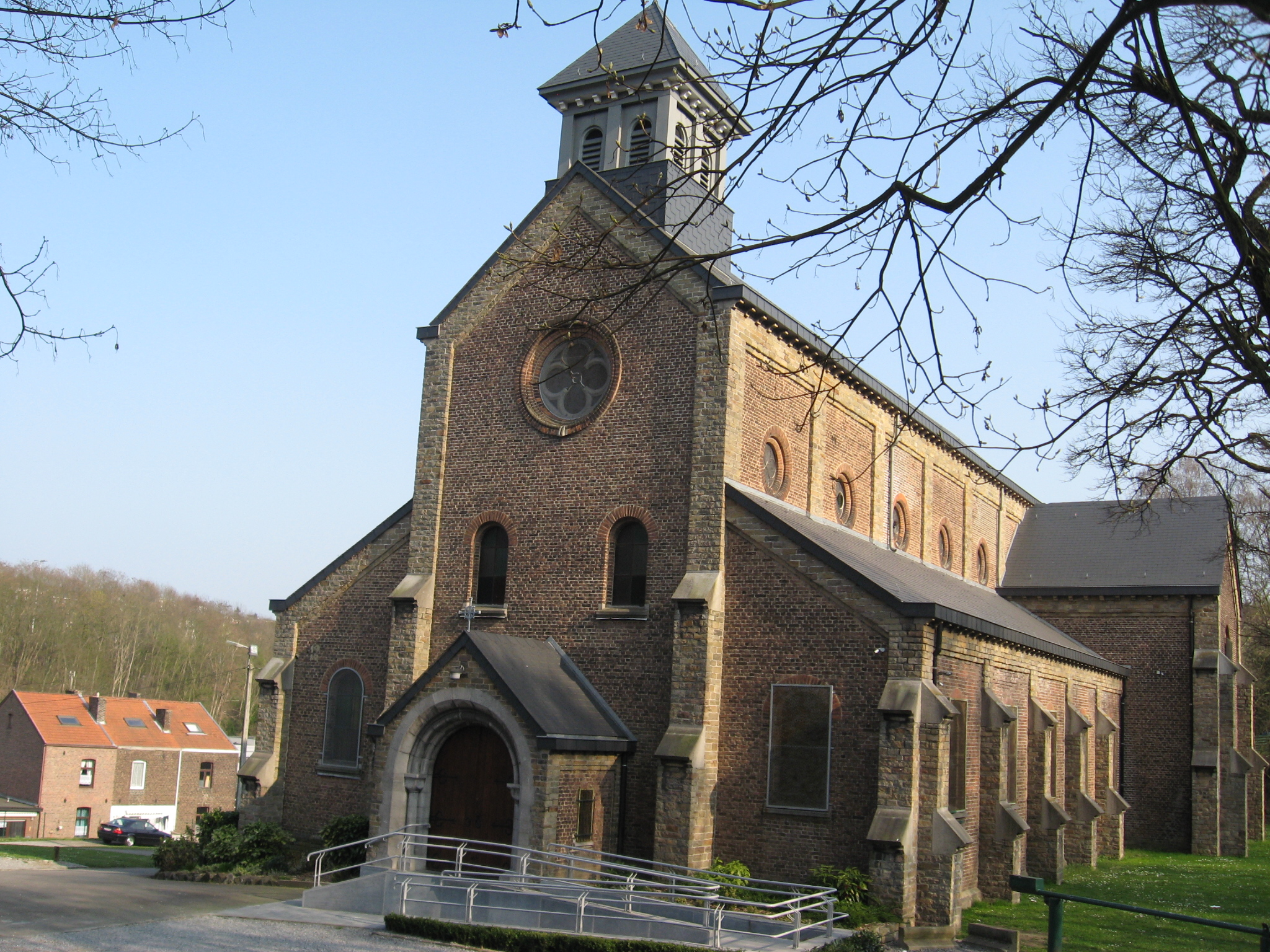 Sint-Jozefkerk te Jemeppe-sur-Meuse, Seraing